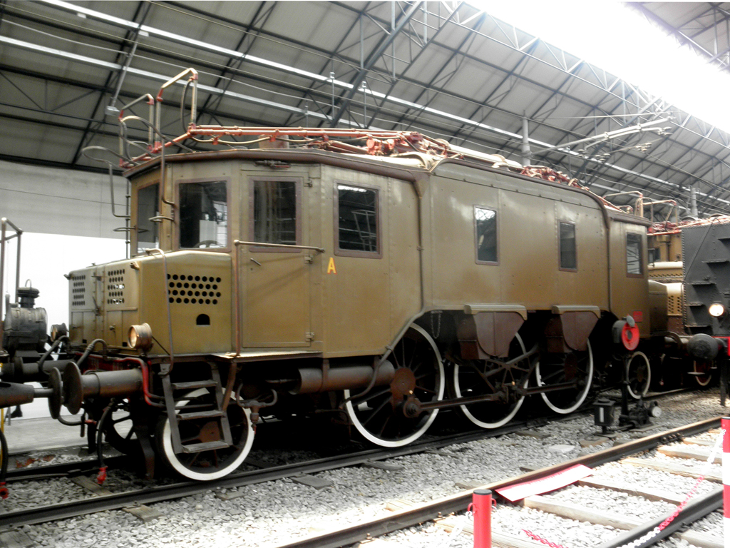 Locomotiva gruppo E.330 delle Ferrovie dello Stato, conservata al Museo della Scienza e della Tecnologia di Milano